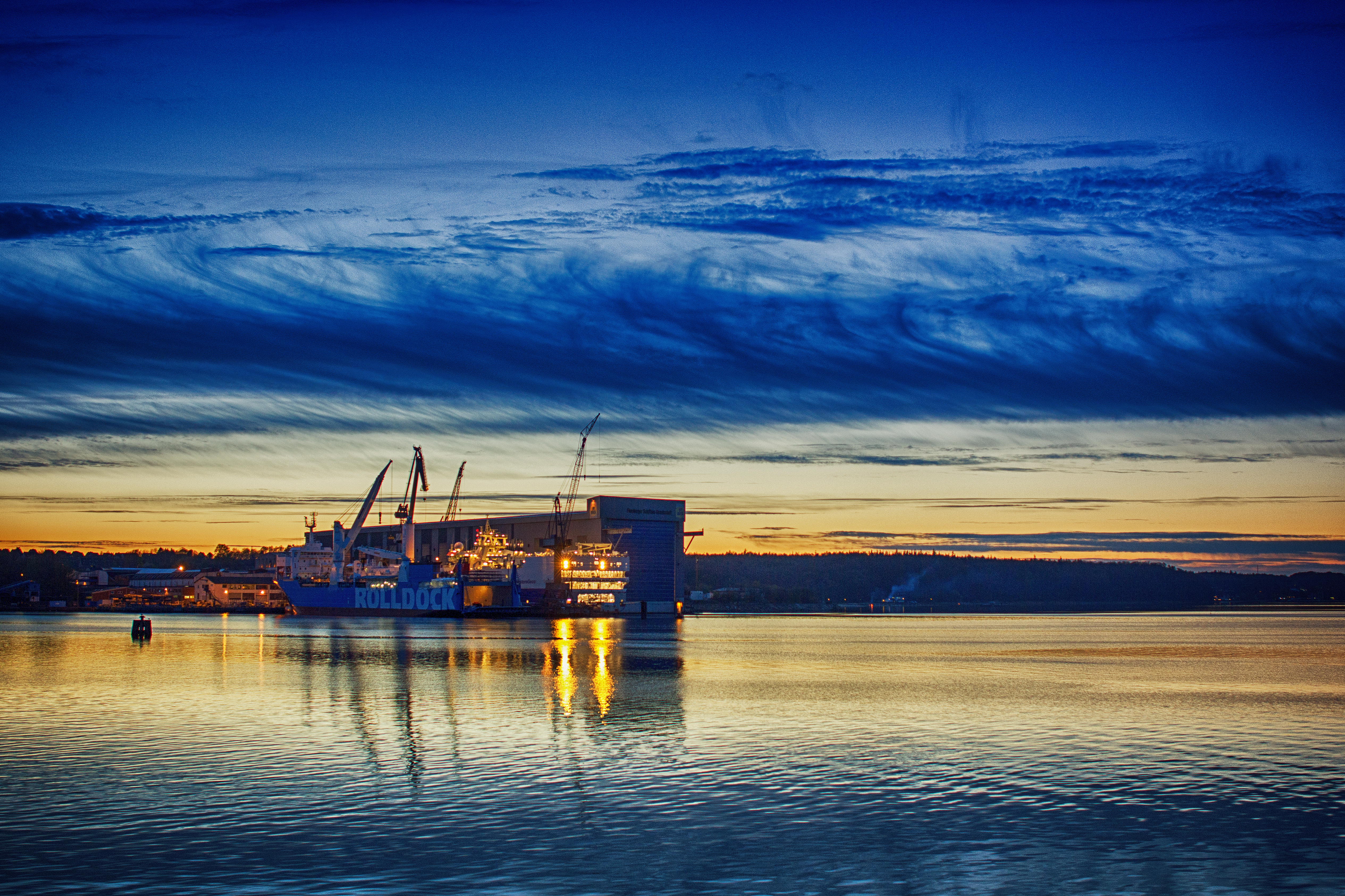 Die Flensburger Werft am Abend